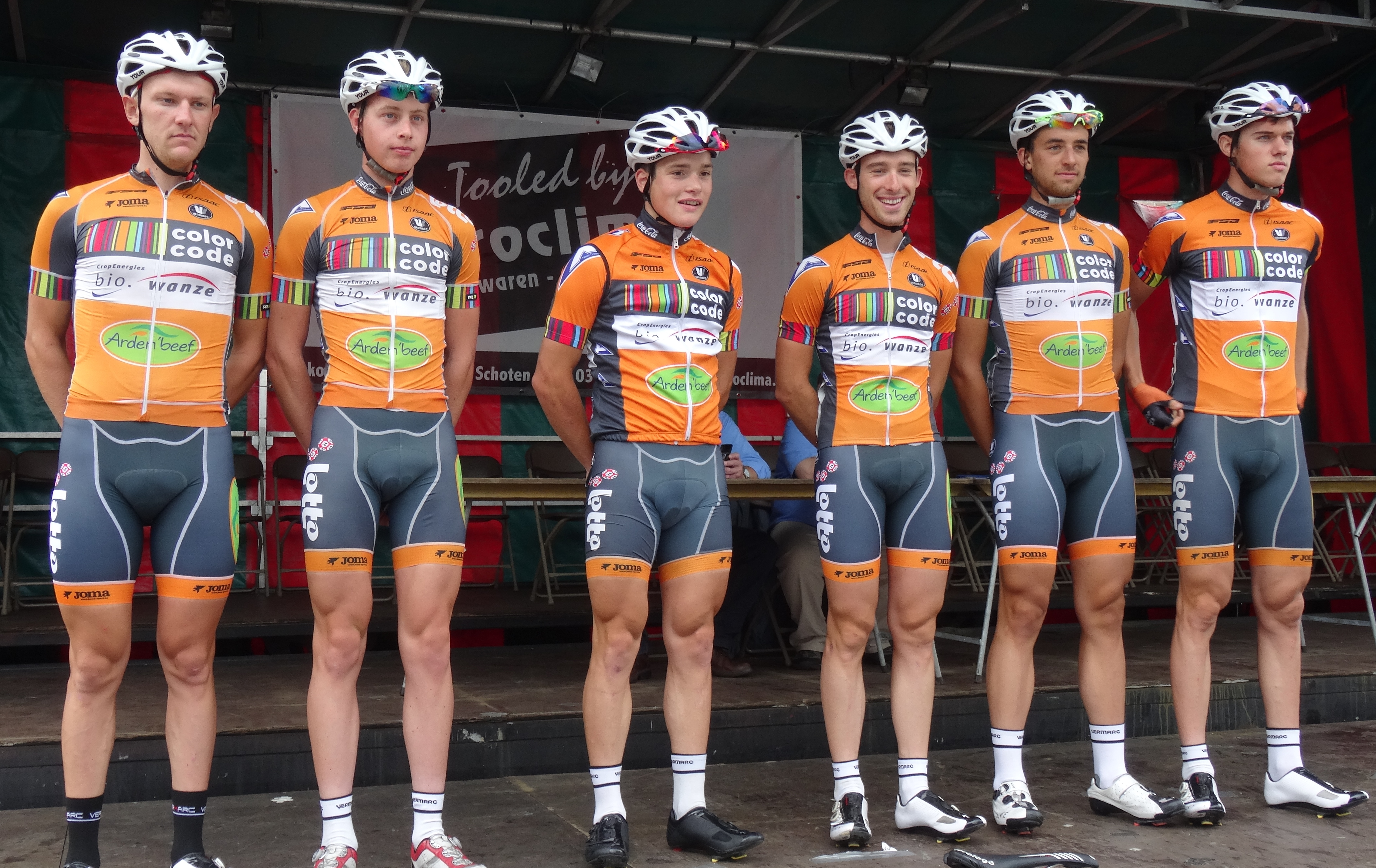 Reportage photographique réalisé le dimanche 10 août à l'occasion du départ et de l'arrivée de la Flèche du port d'Anvers 2014 à Merksem (Anvers), Belgique.